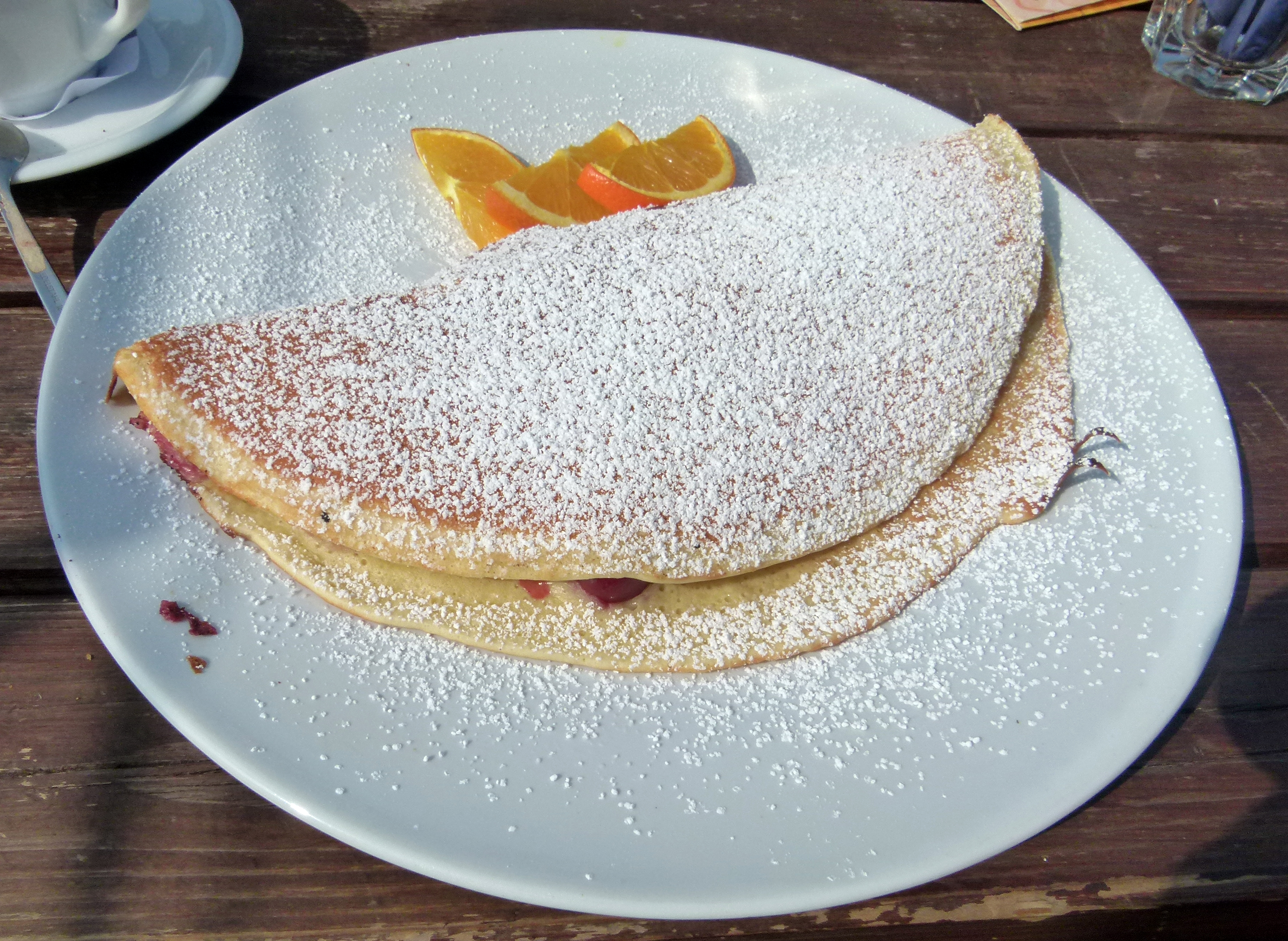 Pfannkuchen in Bremen, Pannekoekschip